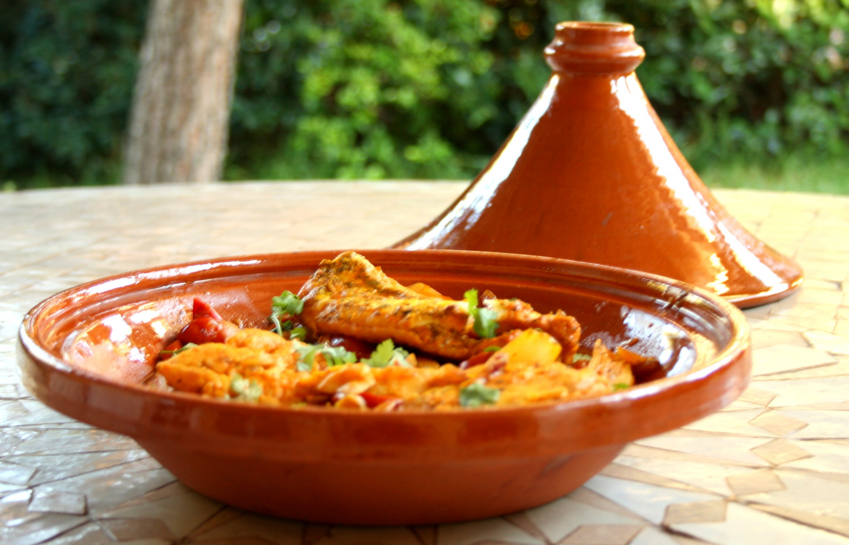 Le mot tajine, ou tagine, désigne, d'une part un ustensile de cuisine traditionnel du Maghreb et particulièrement du Maroc, plat de cuisson creux en terre cuite vernissée, surmontée d'un couvercle conique, et d'autre part, une préparation culinaire cuite dans cet ustensile, sorte de ragoût cuit à l'étouffée, qui peut être composé de viande, de volaille ou de poisson, de légumes ou de fruits.